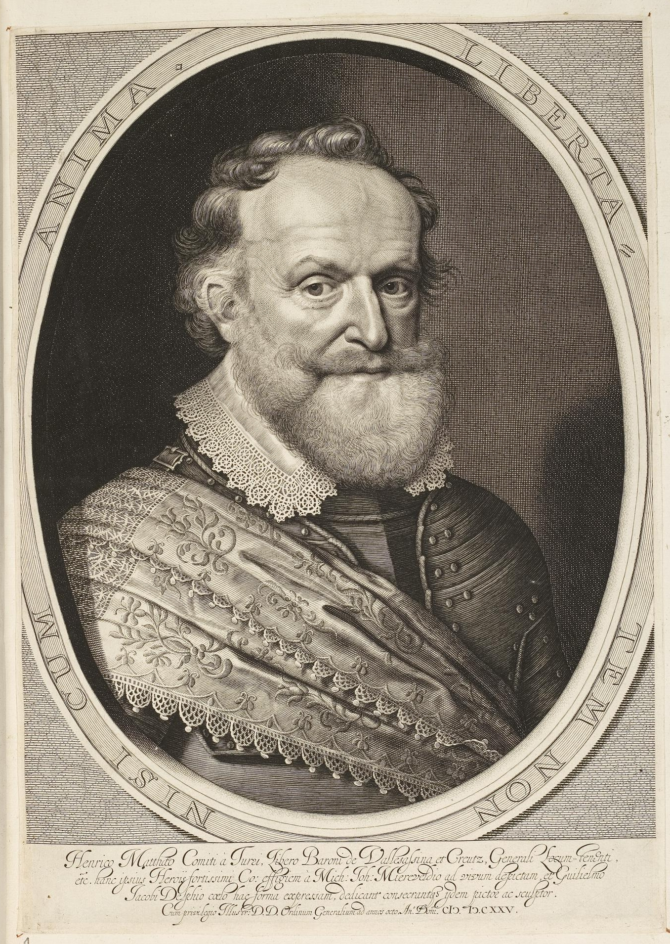 Grafik aus dem Klebeband Nr. 1 der Fürstlich Waldeckschen Hofbibliothek Arolsen Motiv: Heinrich Matthias von Thurn, einer der Hauptführer des böhmischen Aufstandes gegen Ferdinand II.